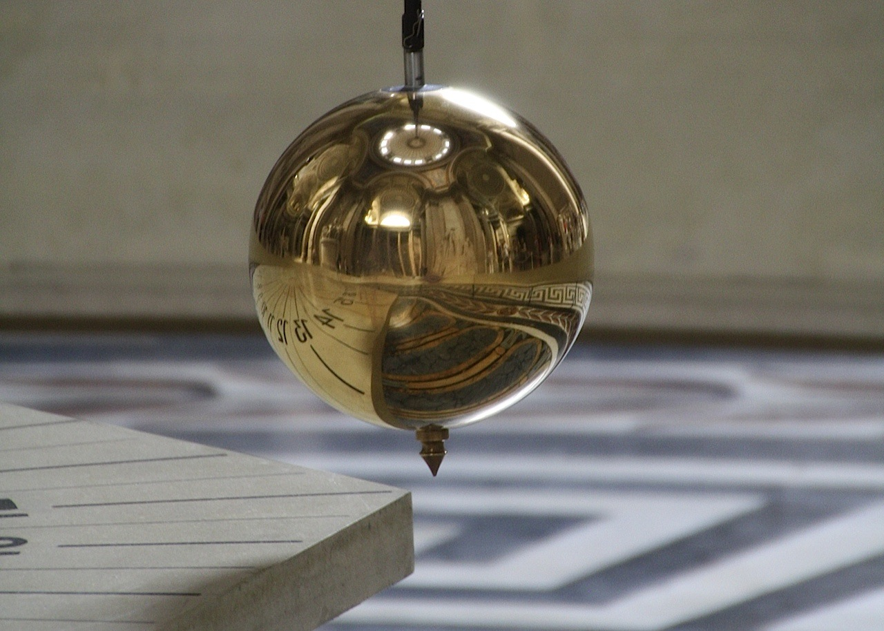 Un péndulo de Foucault es un péndulo esférico que puede oscilar libremente en cualquier plano vertical y capaz de oscilar durante mucho tiempo (horas). Se utiliza para demostrar la rotación de la Tierra y el efecto Coriolis. Se llama así en honor de su inventor, Léon Foucault. En esta fotografía se muestra el péndulo que se encuentra en el Panteón de París. Su importancia histórica radica en que con él se hizo la primera demostración, en 1851. El péndulo se fijó a la cúpula del Panteón de París; medía 67 m y llevaba una masa de 28 kg. Una vez lanzado, el péndulo oscilaba durante 6 h. El periodo es de 16,5 s; el péndulo se desviaba 11° por hora. Su ciclo de giro completo dura algo más de 32 horas.